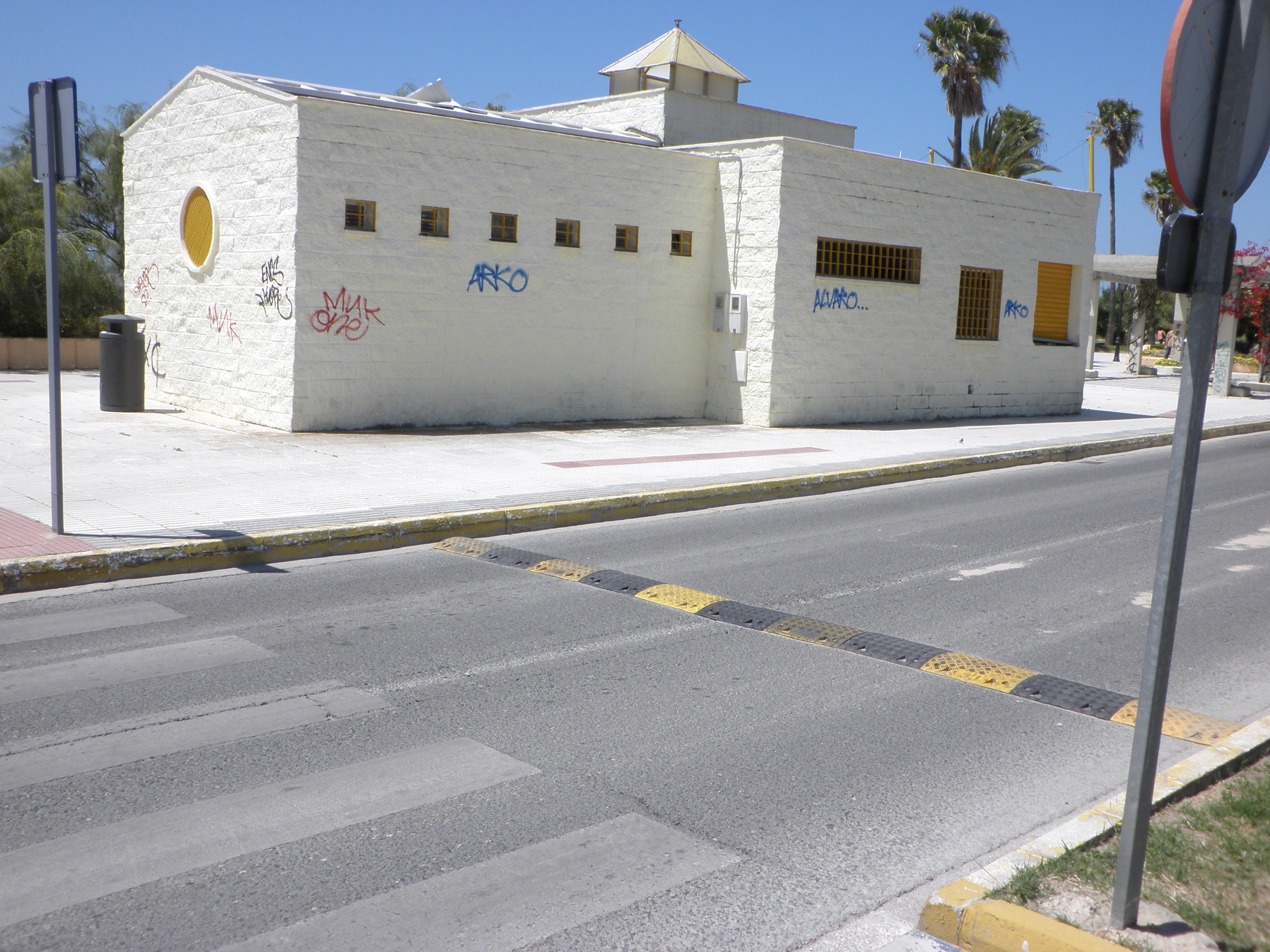 Tramo con resalto